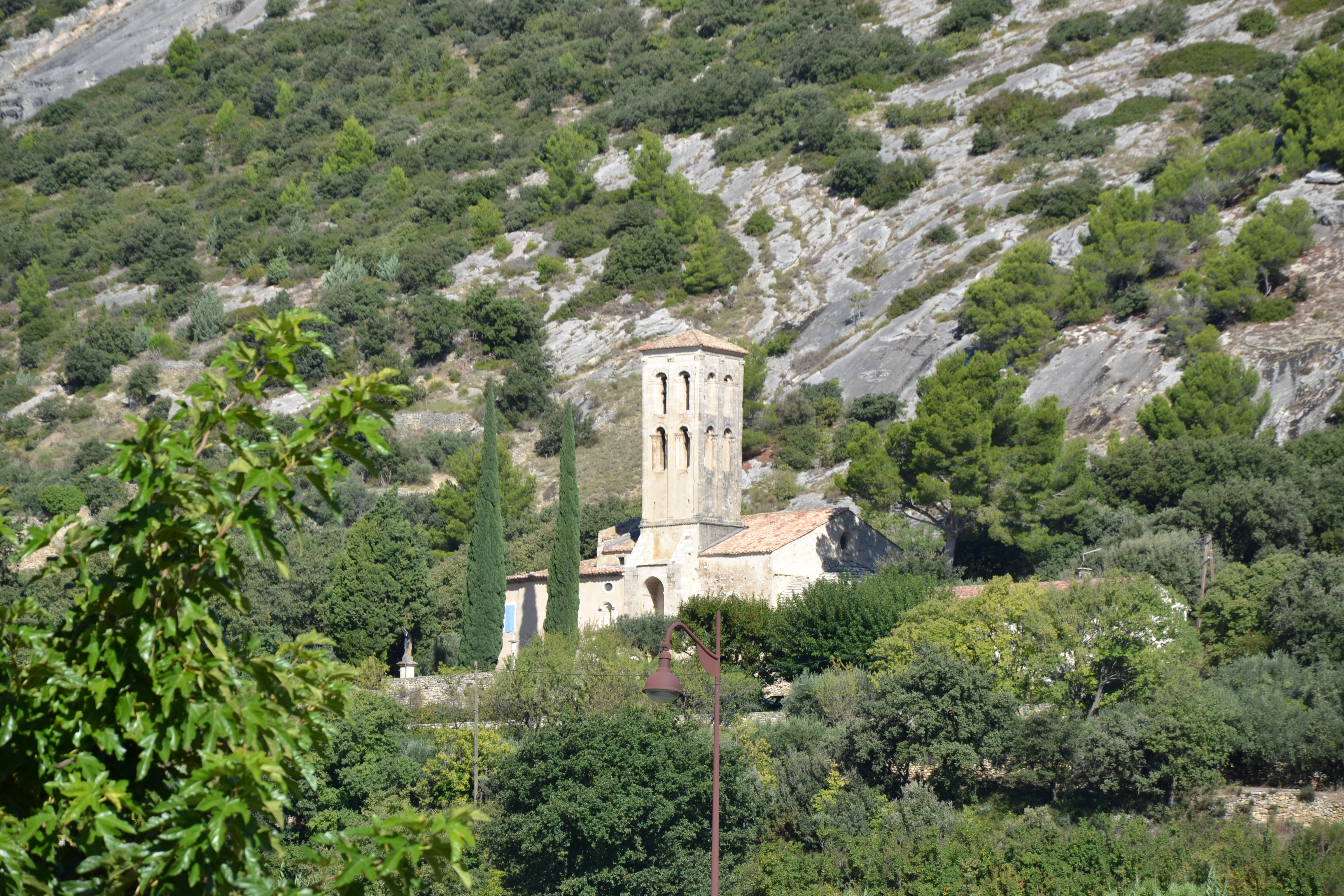 Chapelle Notre-Dame d'Aubune .